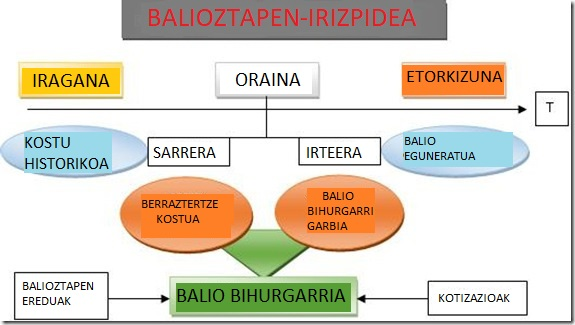 Balioztapen-irizpidearen eskema